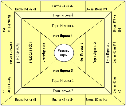 Шаблон пули «конверт» для игры в преферанс